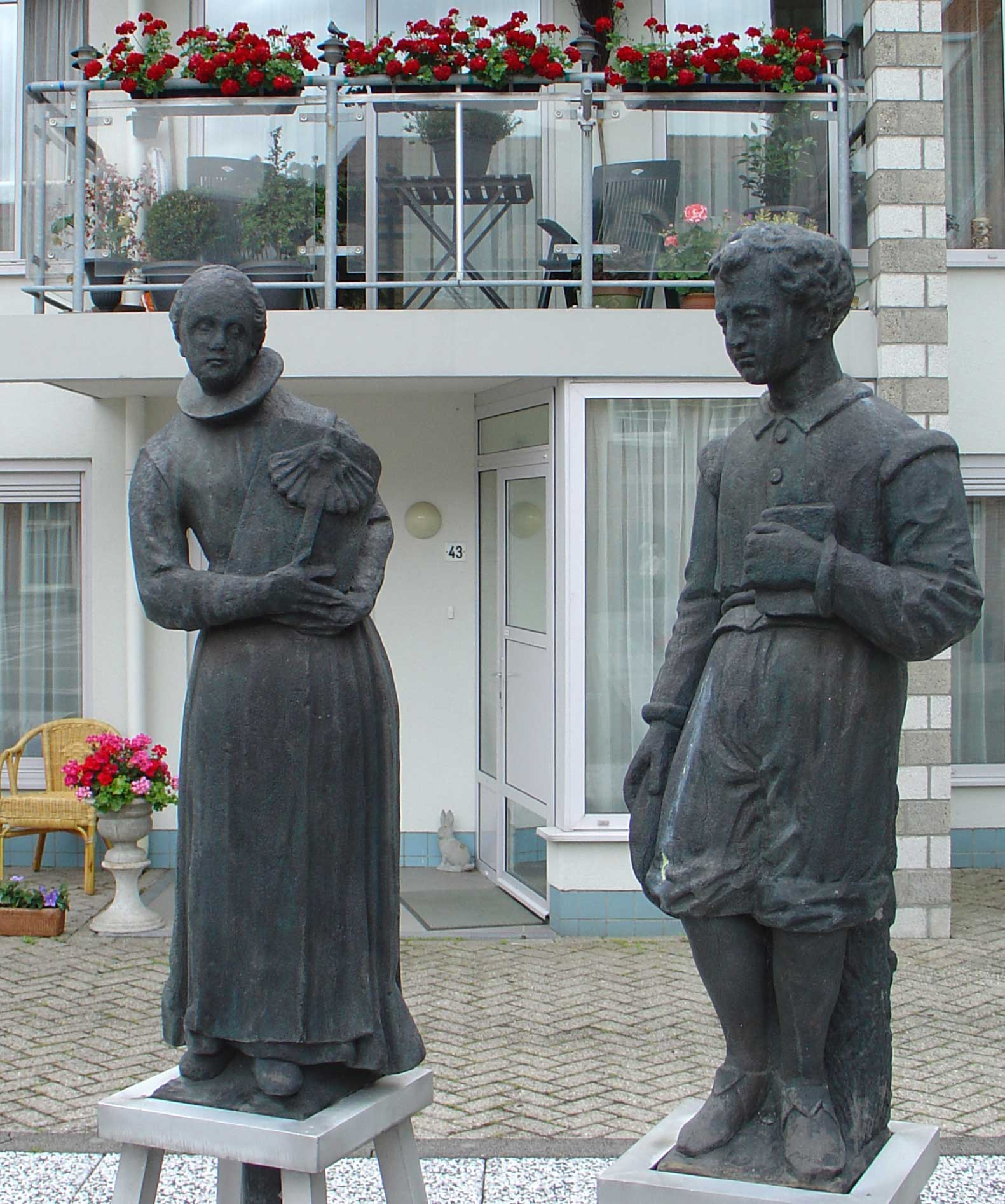 Roode Weeshuis Groningen (binnenplein)